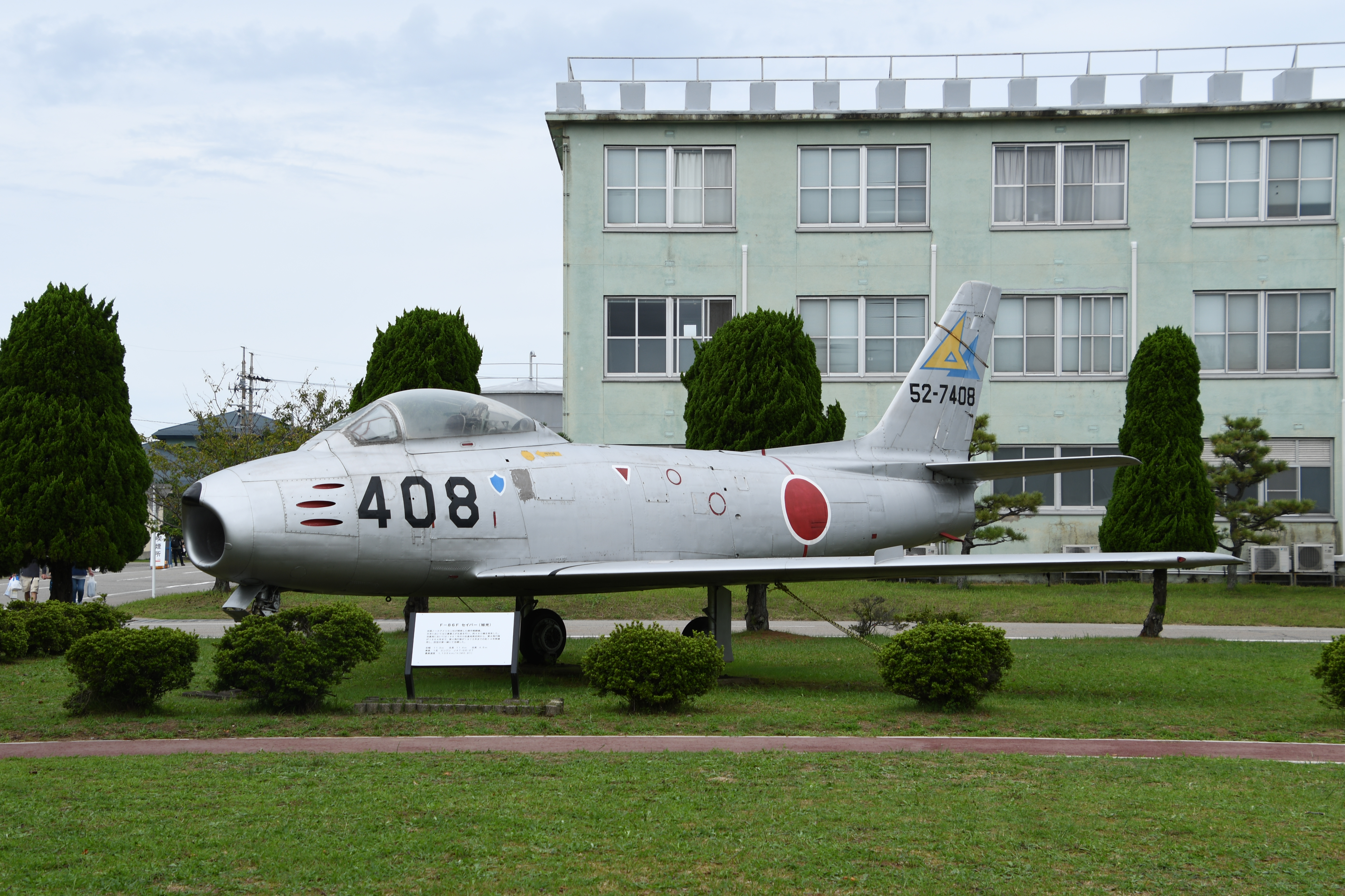 航空自衛隊 F-86F戦闘機（52-7408号機） 左前面。2018年9月17日 小松基地にて。